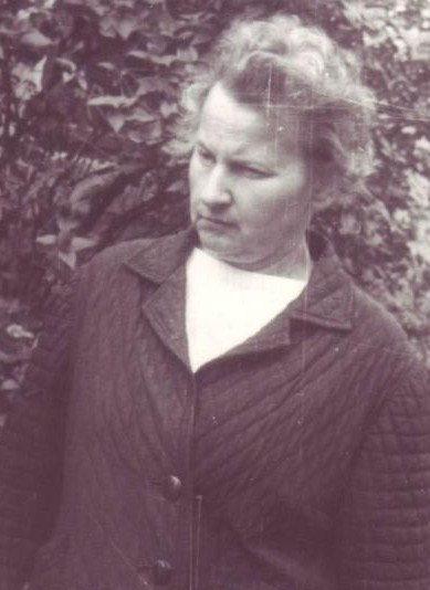 Stefania Światłowska, łacinniczka z LO im. Reytana - zdj. z 1969r.